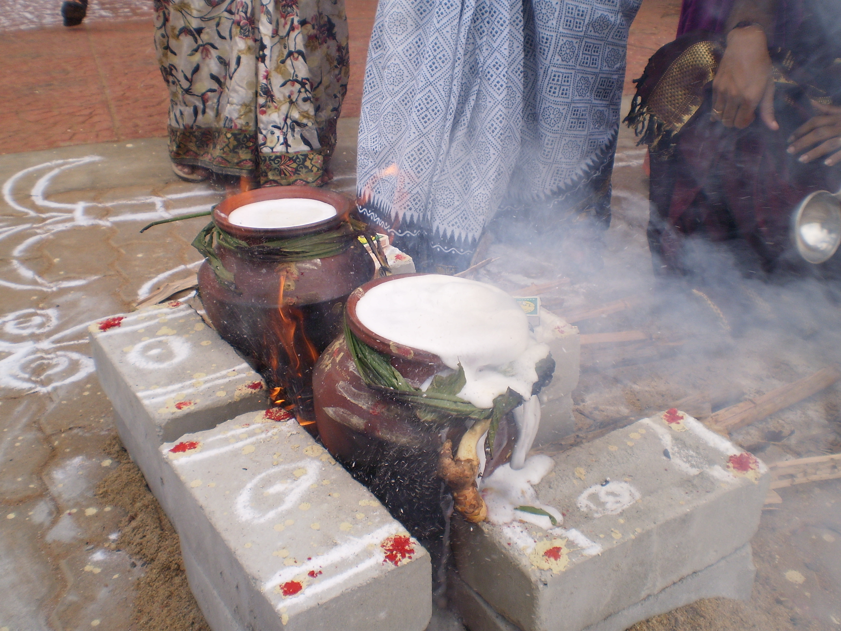 பொங்கலோ பொங்கல்